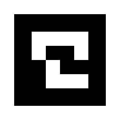 El marcador RA de el pokemon snivy, que es pot usar en la aplicacio Pokedex 3D